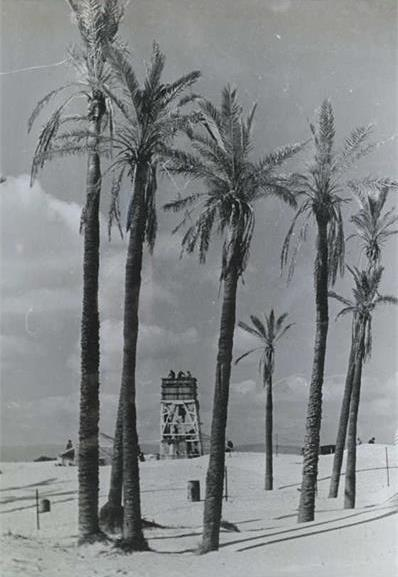 אפק - מגדל הצופים על שפת ים עכו